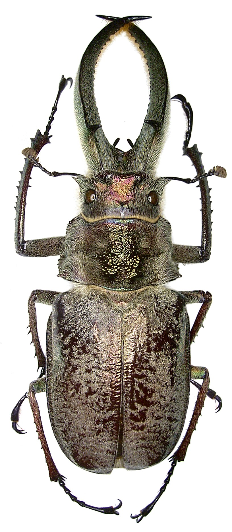 Familie: Lucanidae Grösse: 51-76,4 mm Verbreitung: Kolumbien, Venezuela, Ekuador, Peru, Bolivien Fundort: Peru, an Pedro, Manu-Park leg. 1998; det. U.Schmidt Foto: U.Schmidt, 2006